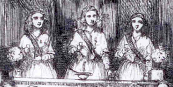 Détail du dessinde Henri Emy figurant une soirée de goguette présidée par des dames en 1845.